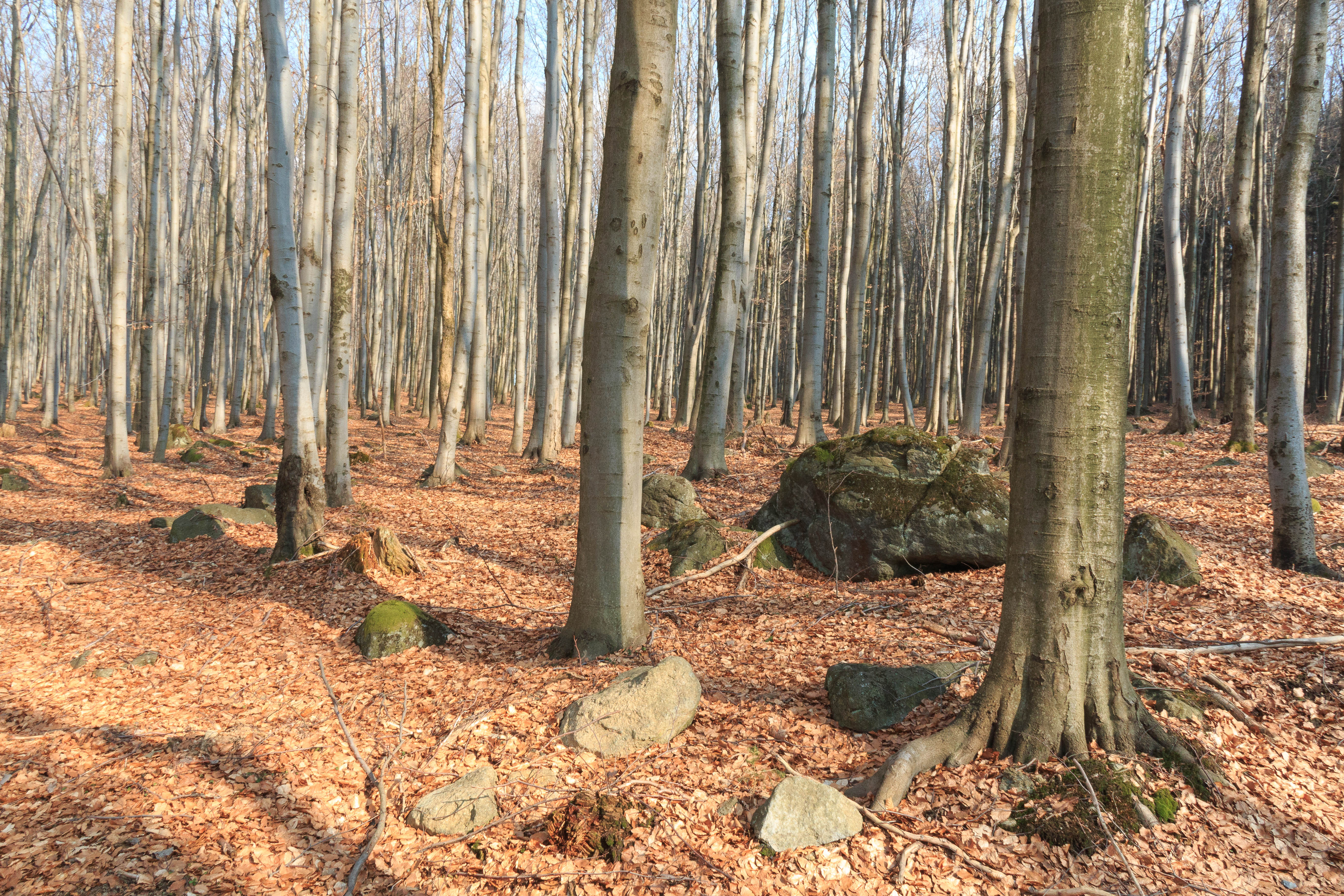 NPR Ransko Project: Chráněná území